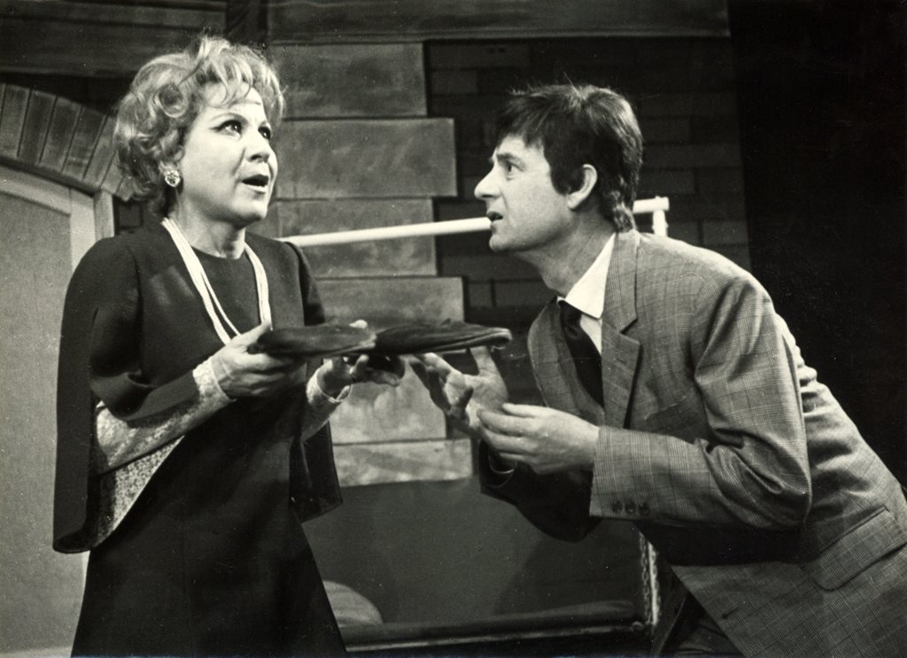 Alan Ayckbourn, Polovične resnice, Mestno gledališče ljubljansko. Na fotografiji: Tina Leonova (Sheila), Zlatko Šugman (Greg).